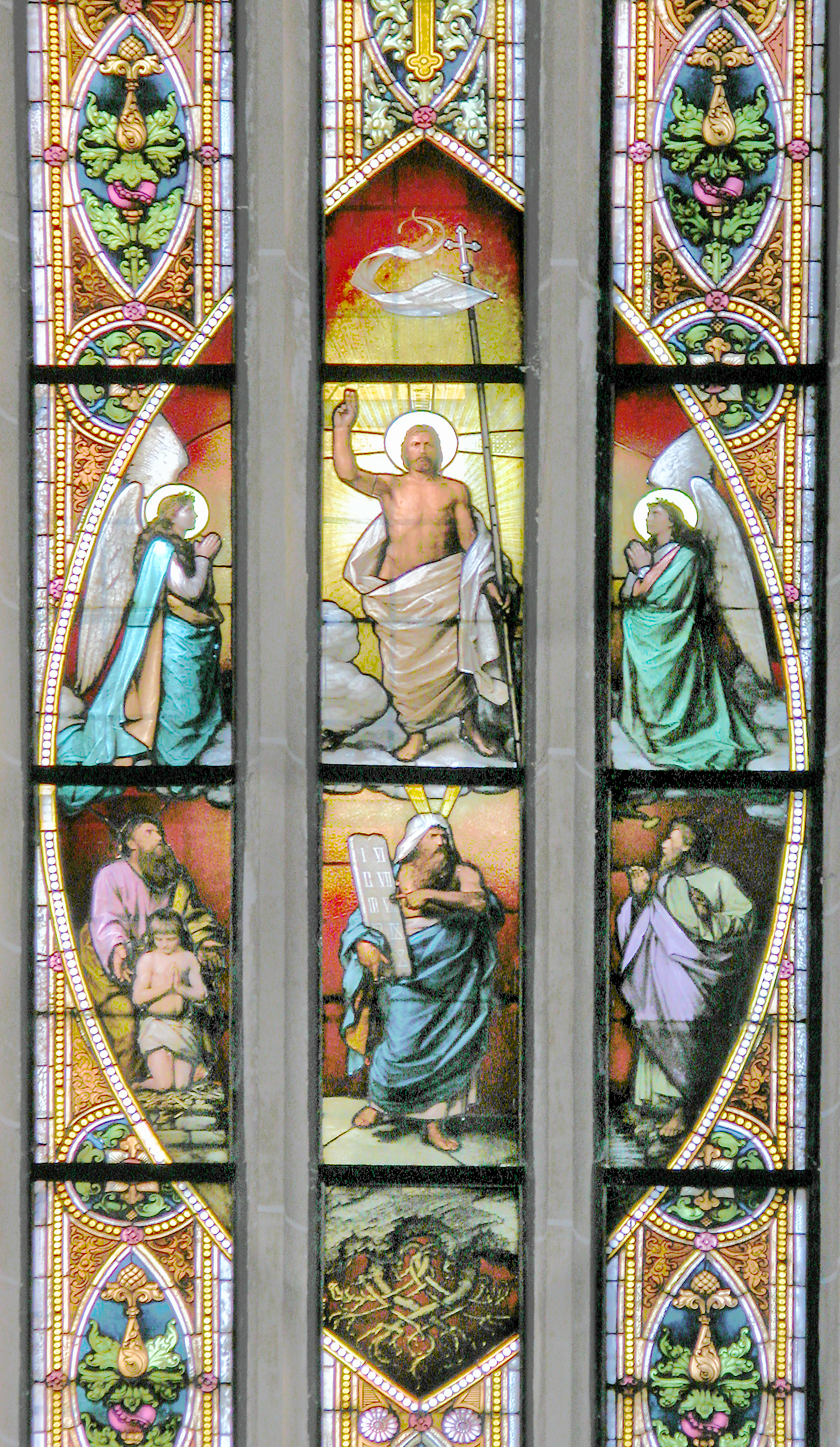 03.05.2009 04774 Dahlen (Sachsen), Kirchstraße (GMP: 51.364957,13.000966): Stadtkirche Unserer Lieben Frauen. Mittleres Kathedralglasfenster hinter dem Altar. Die Bleiverglasung der Chorfenster fertigte die Dresdner Glasmalereiwerkstatt Anemüllers Nachfahren 1895 an. [DSCN37116.TIF]20090503187DR.JPG(c)Blobelt